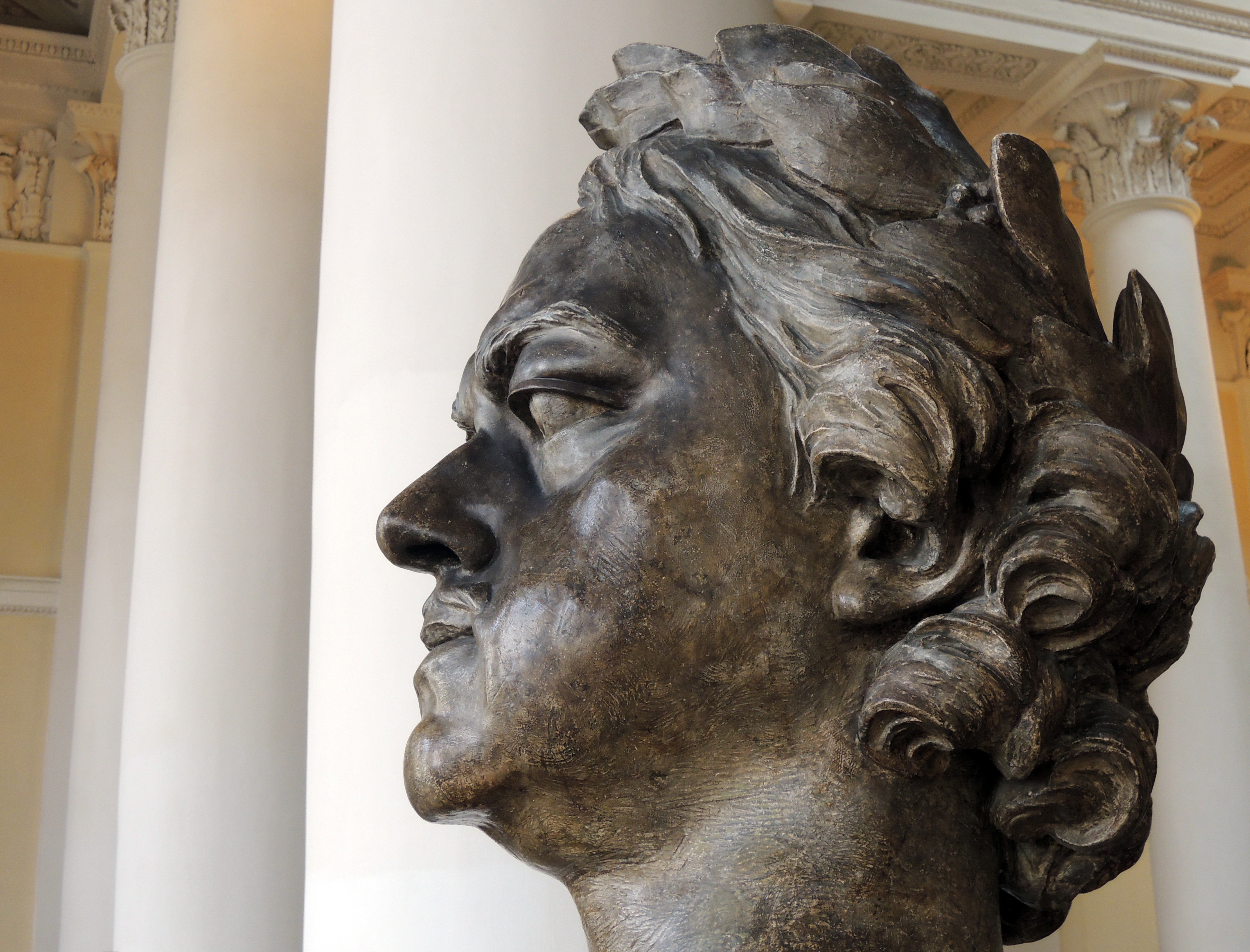 Скульптура в Верхнем вестибюле Русского музея. Мари Анн Колло. Мрдель головы Петра I (гипс, около 1773, Русский музей)